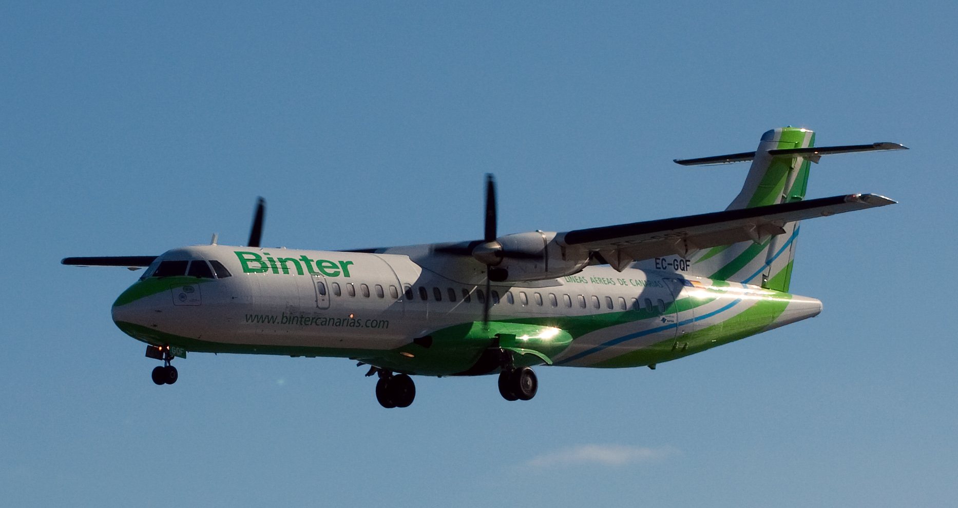 Binter Canarias/Naysa ATR72 EC-GQF